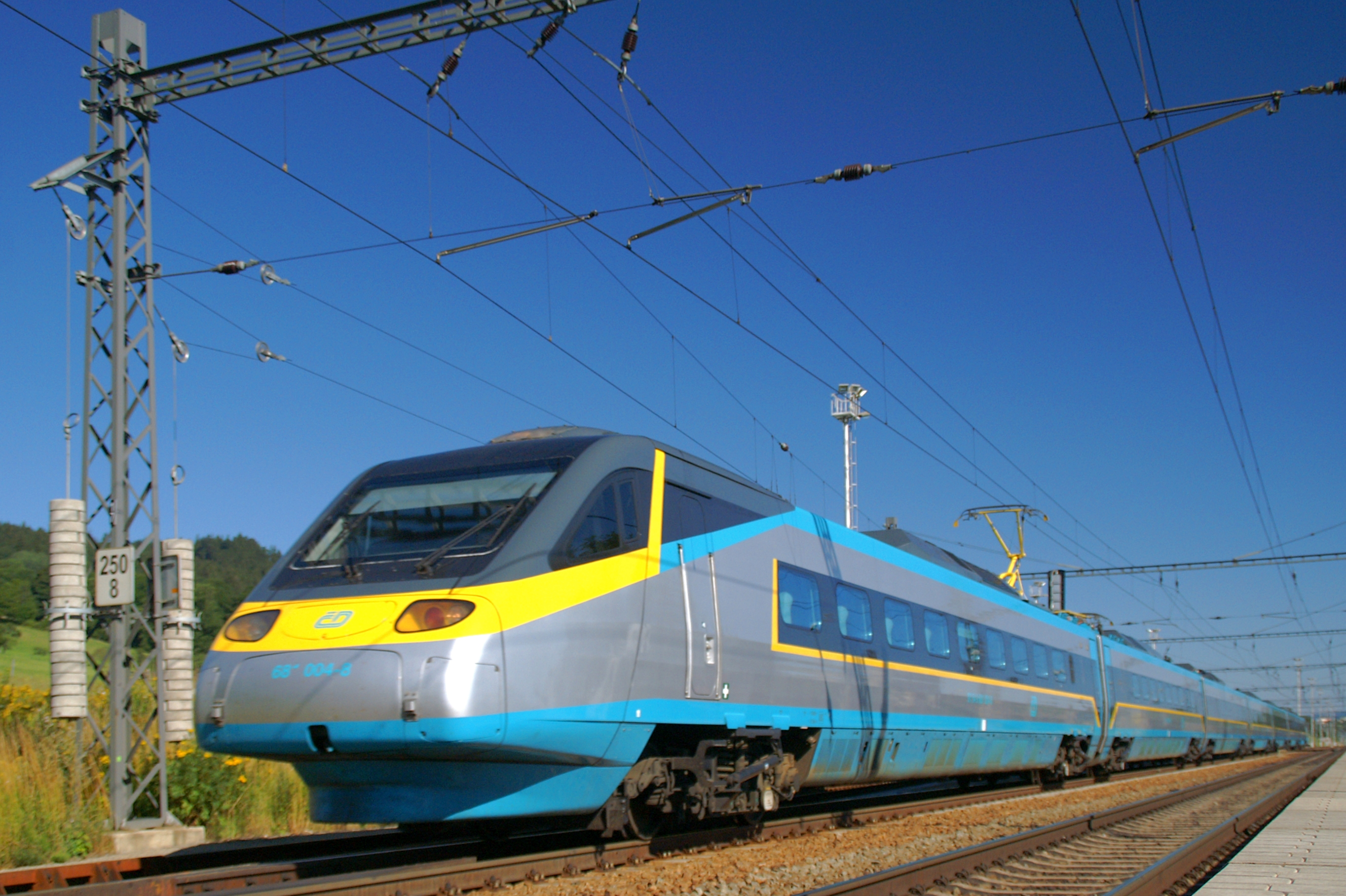 Ústí nad Orlicí město